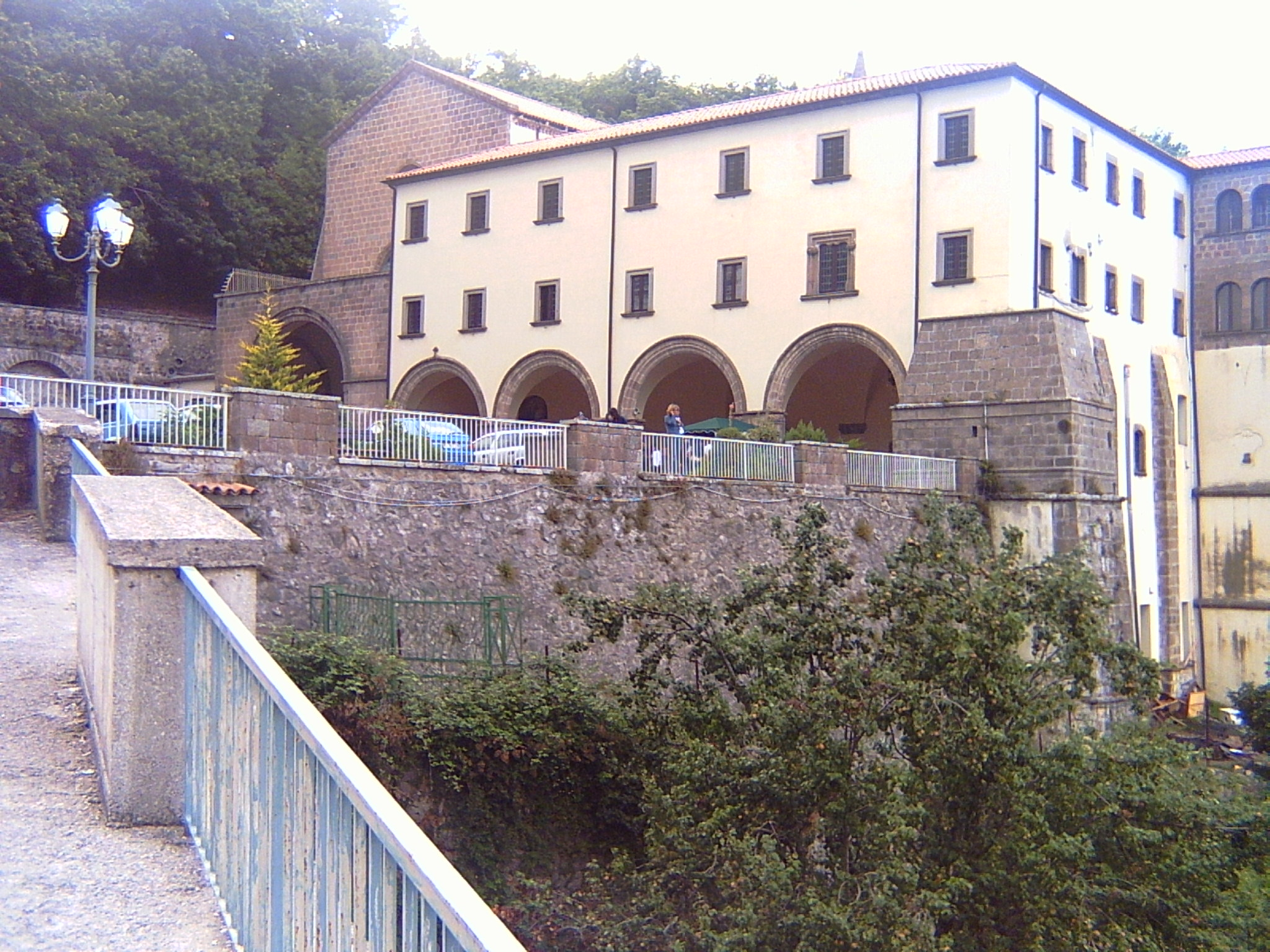 Santa Maria dei Lattani Shrine near Roccamonfina (CE) - Italy